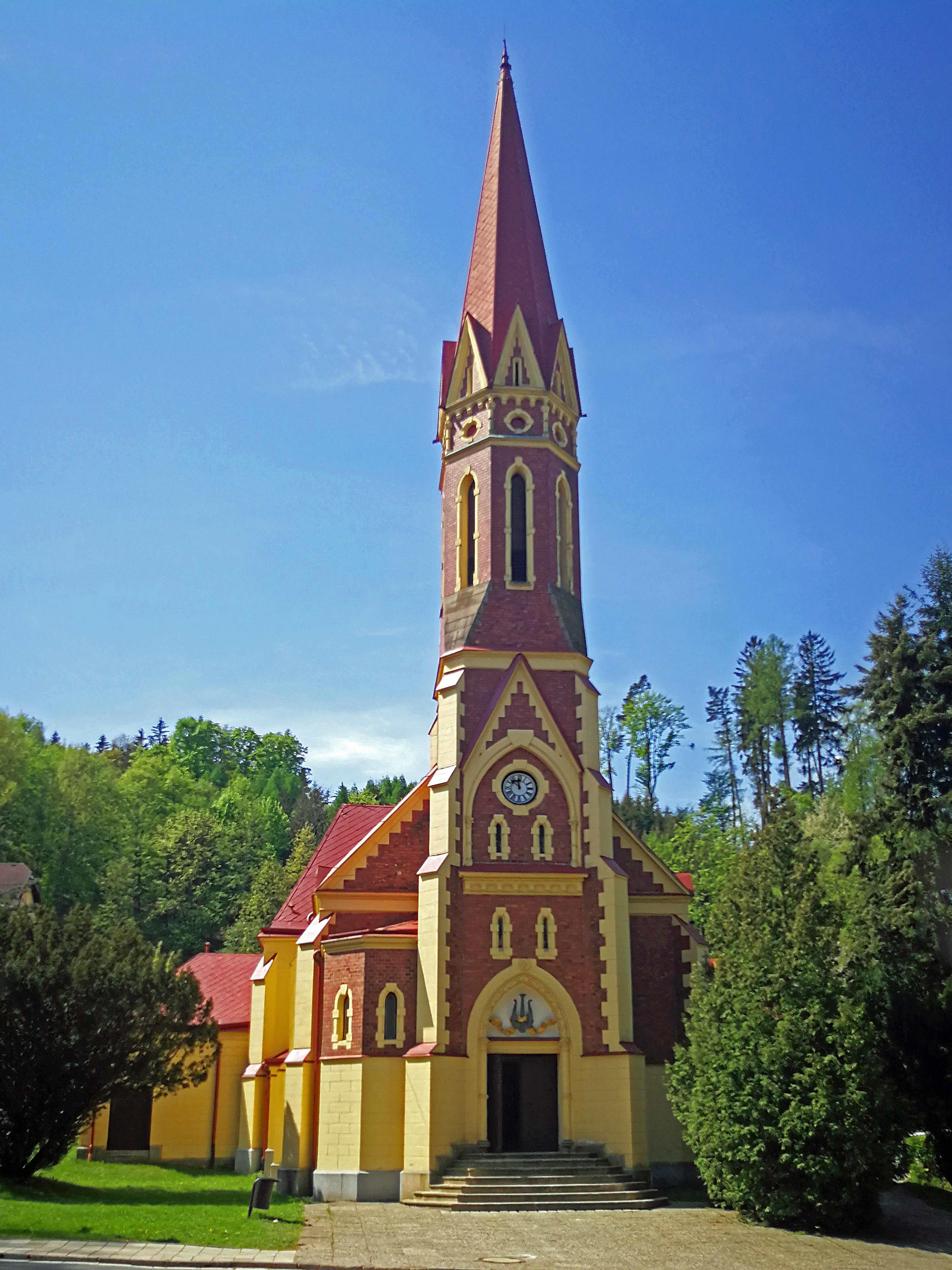 Evangelický kostel Trutnov. Česká republika.